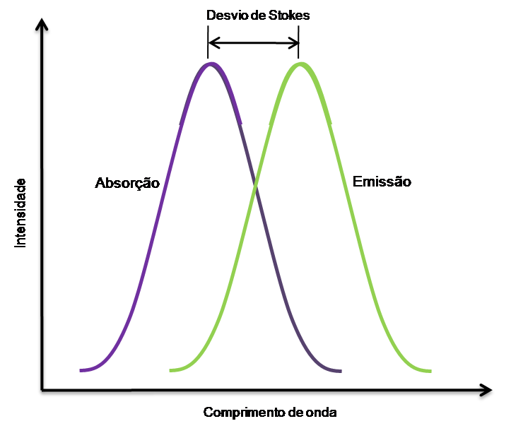 Desvio de Stokes: obtido a partir do intervalo do ponto máximo da curva de absorção com a curva de emissão